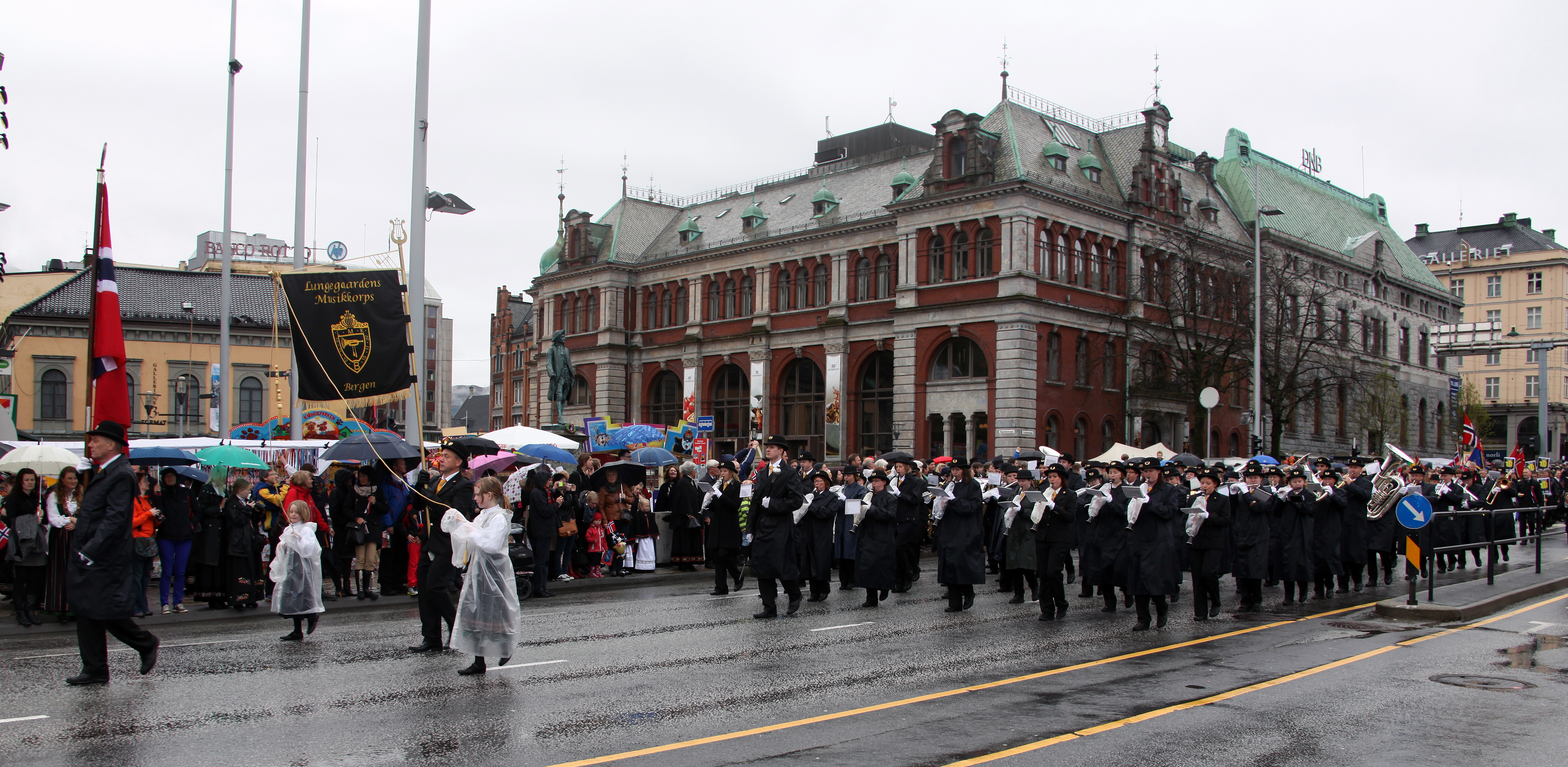 Lungegaardens Musikkorps